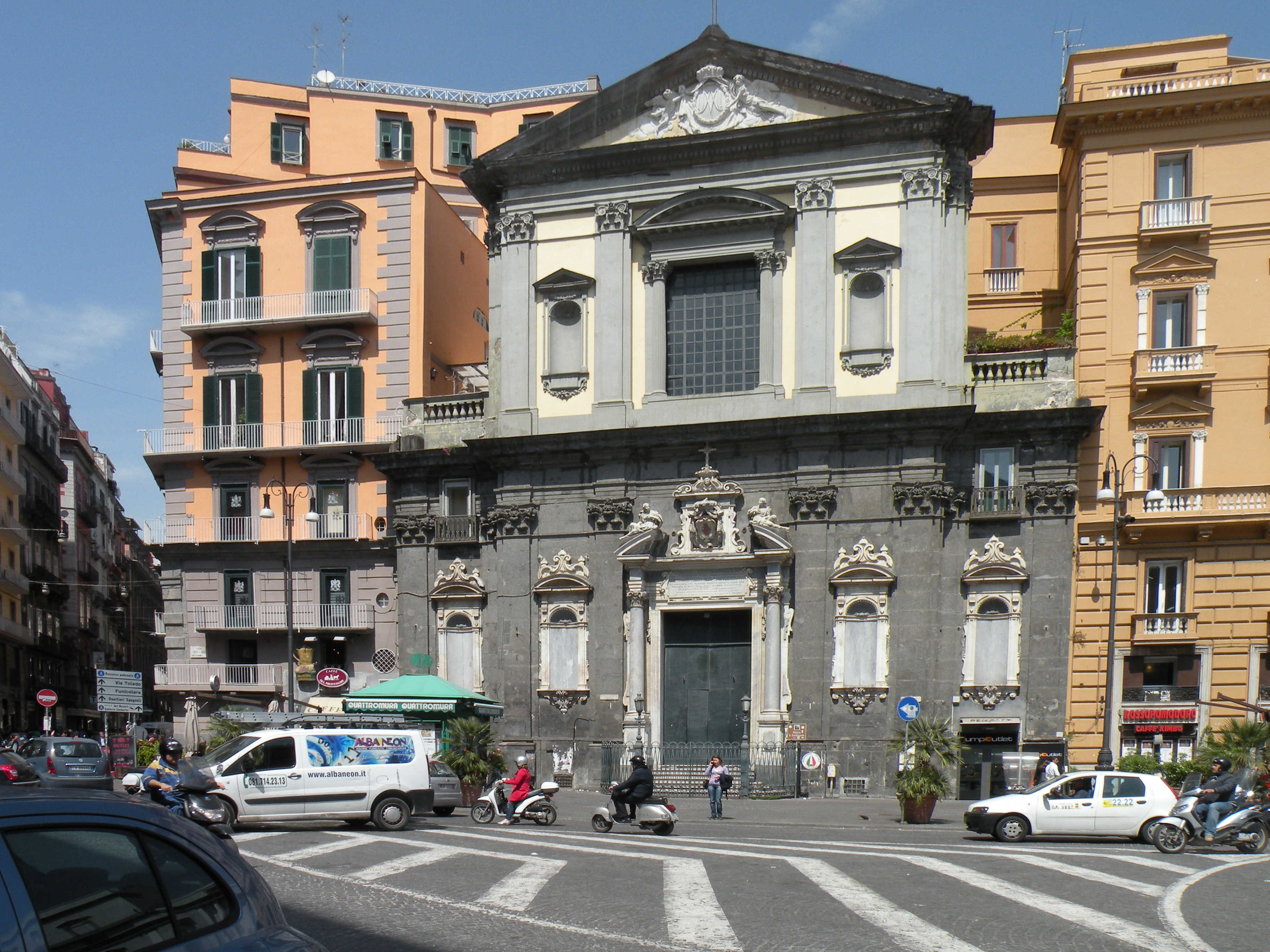 Церковь св. Фердинанда